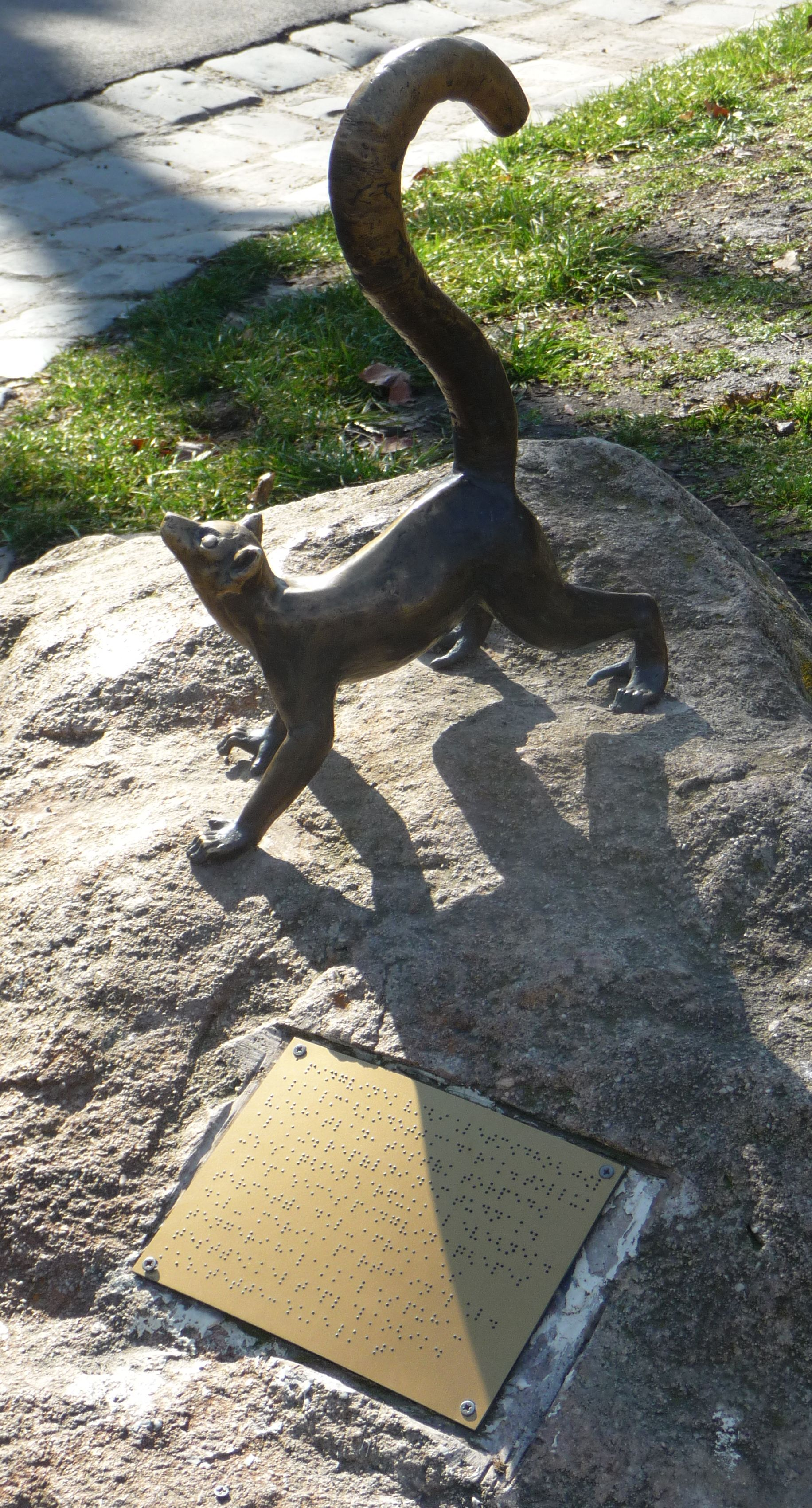 A gyűrűs farkú maki szobra, Braille-írásos tájékoztatóval. Vakok és gyengén látók számára készített állatszobrok /orrszarvú, maki, víziló, tapír, pingvin, fóka.../ (Székely Katalin, 2005, bronz) a Fővárosi Állat- és Növénykertben. Későbbi fénykép ugyanerről a szoborról, a szobor tárgyához kapcsolódó és jobban kinéző tájékoztató táblával: File:Budapest-zoo-maki-szobor.jpg.